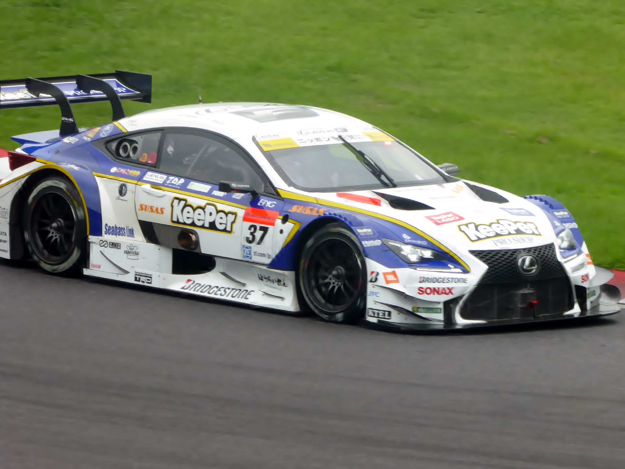 2015年鈴鹿1000㎞において37号車KeePer TOM'S RC Fを撮影。